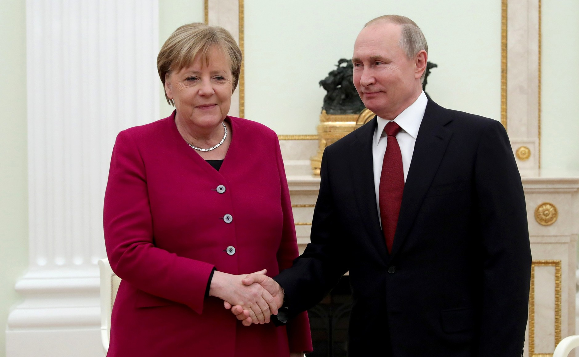 Президент Российской Федерации Владимир Путин с Федеральным канцлером Германии Ангелой Меркель.